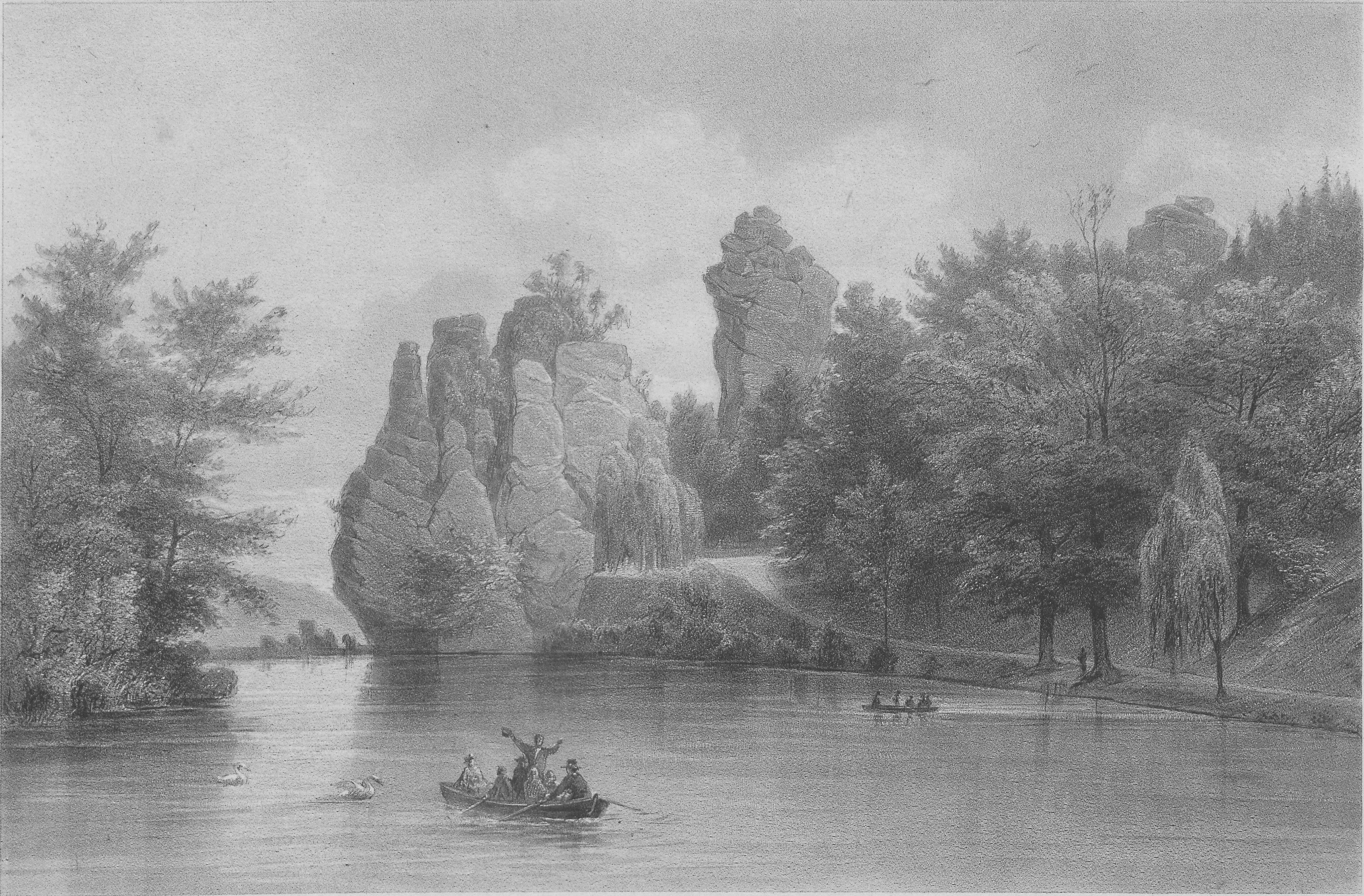 Externsteine Südseite 1875